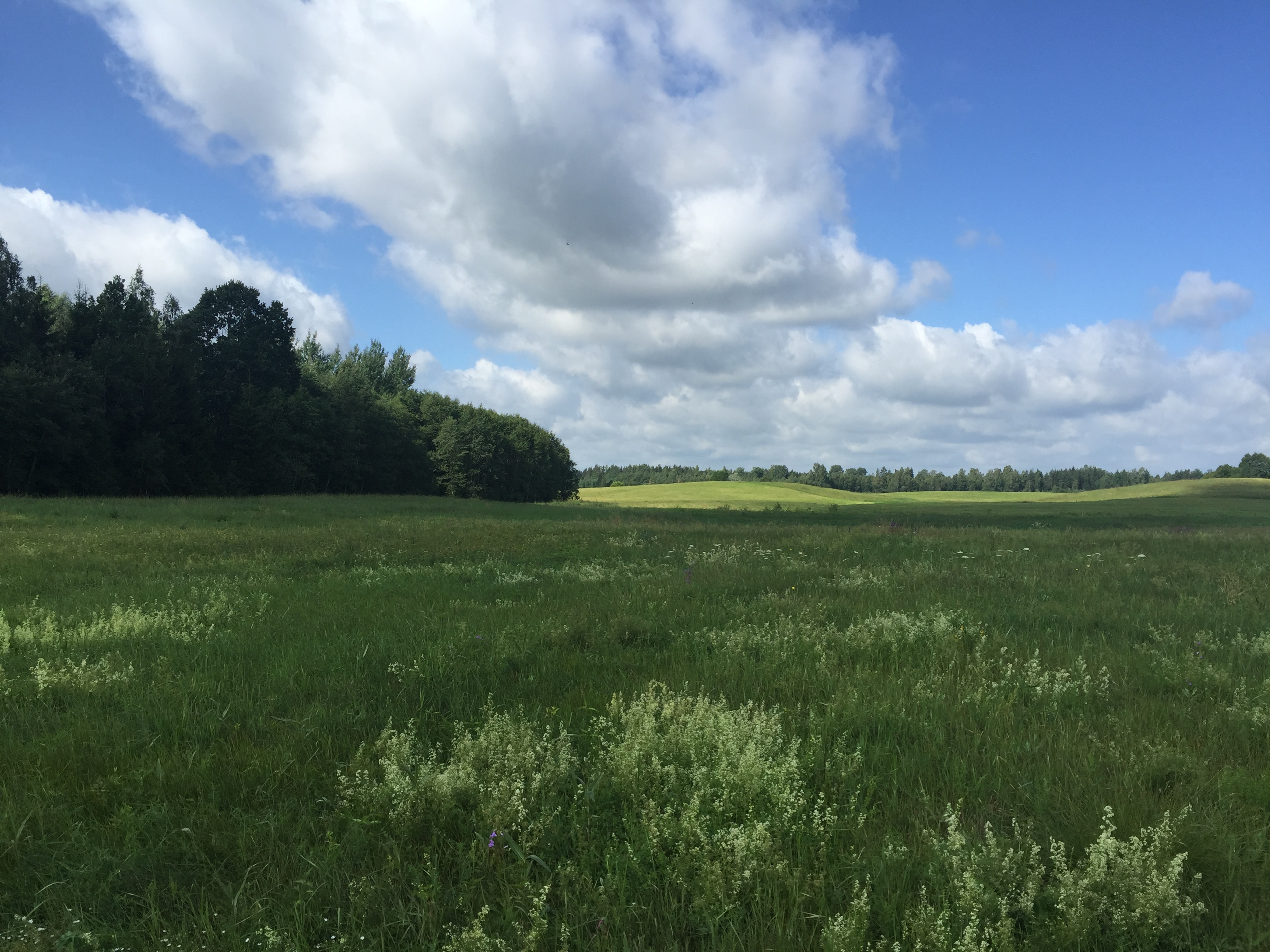 Pļava - ne tikai barība mājlopiem, bet arī skaista ainava, ārstniecības augi un citi labumi